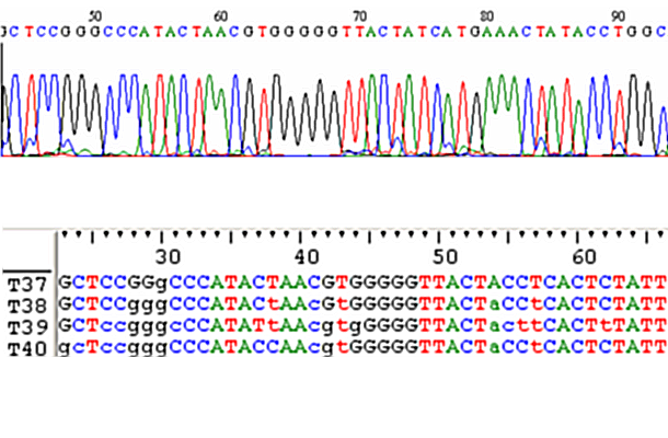 Beispiel für Haplotypisierung. Eigene Aufnahme, eigene Daten.